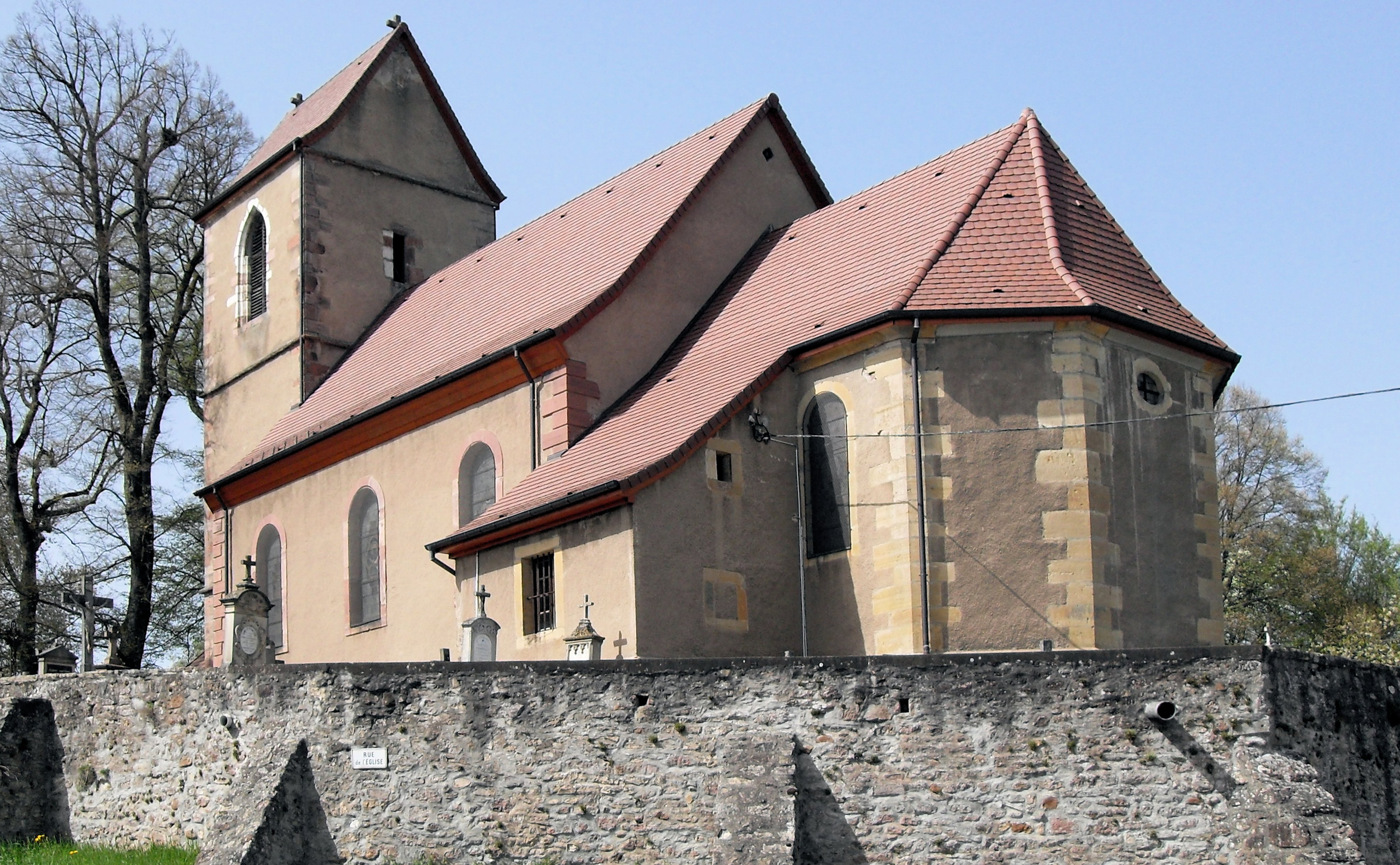 L'église Saint-Côme et Saint-Damien à Saint-Cosme